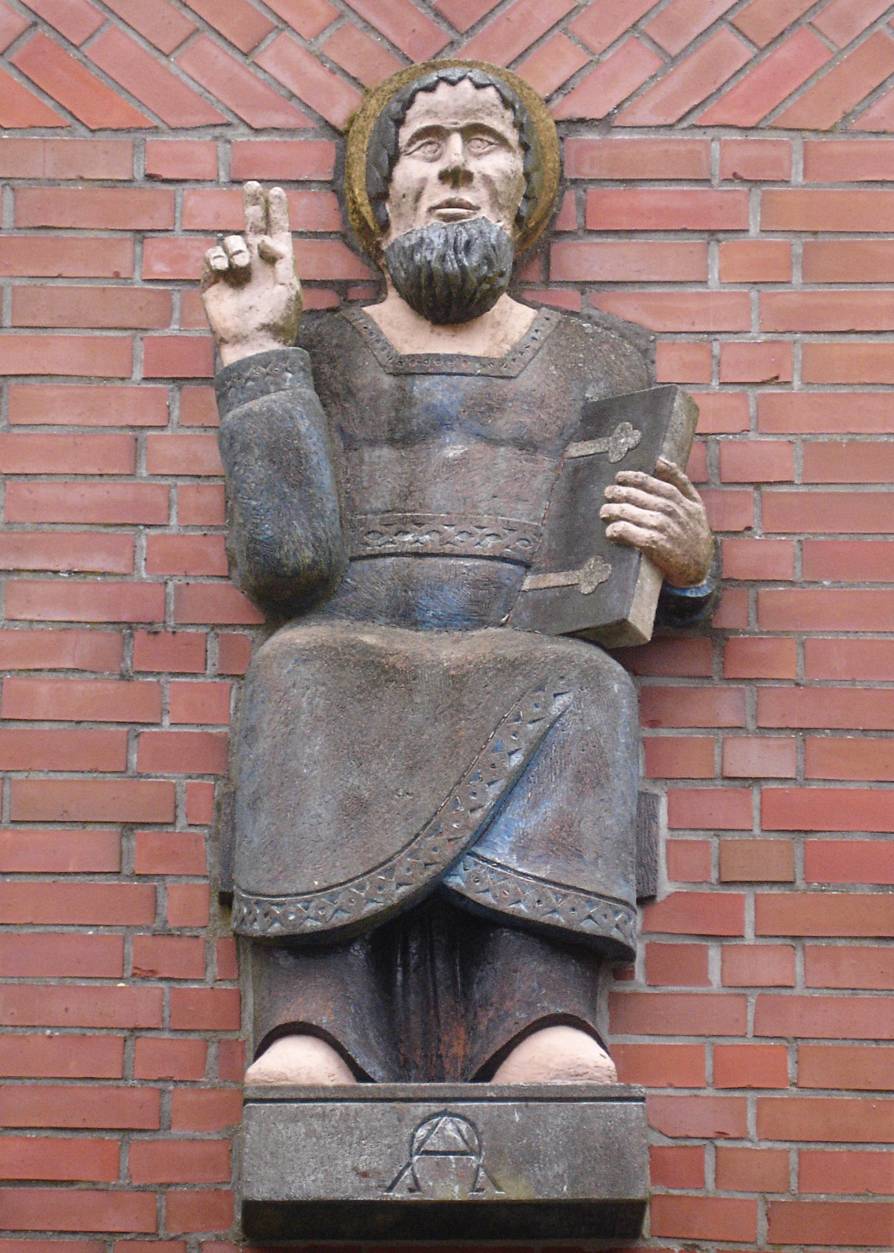 Weltenrichter Plastik an der westlichen Außenwand der Kirche Michaelkirche (Faßberg) Nachbildung nach Sturmschaden Originalfigur von Ludwig Vierthaler